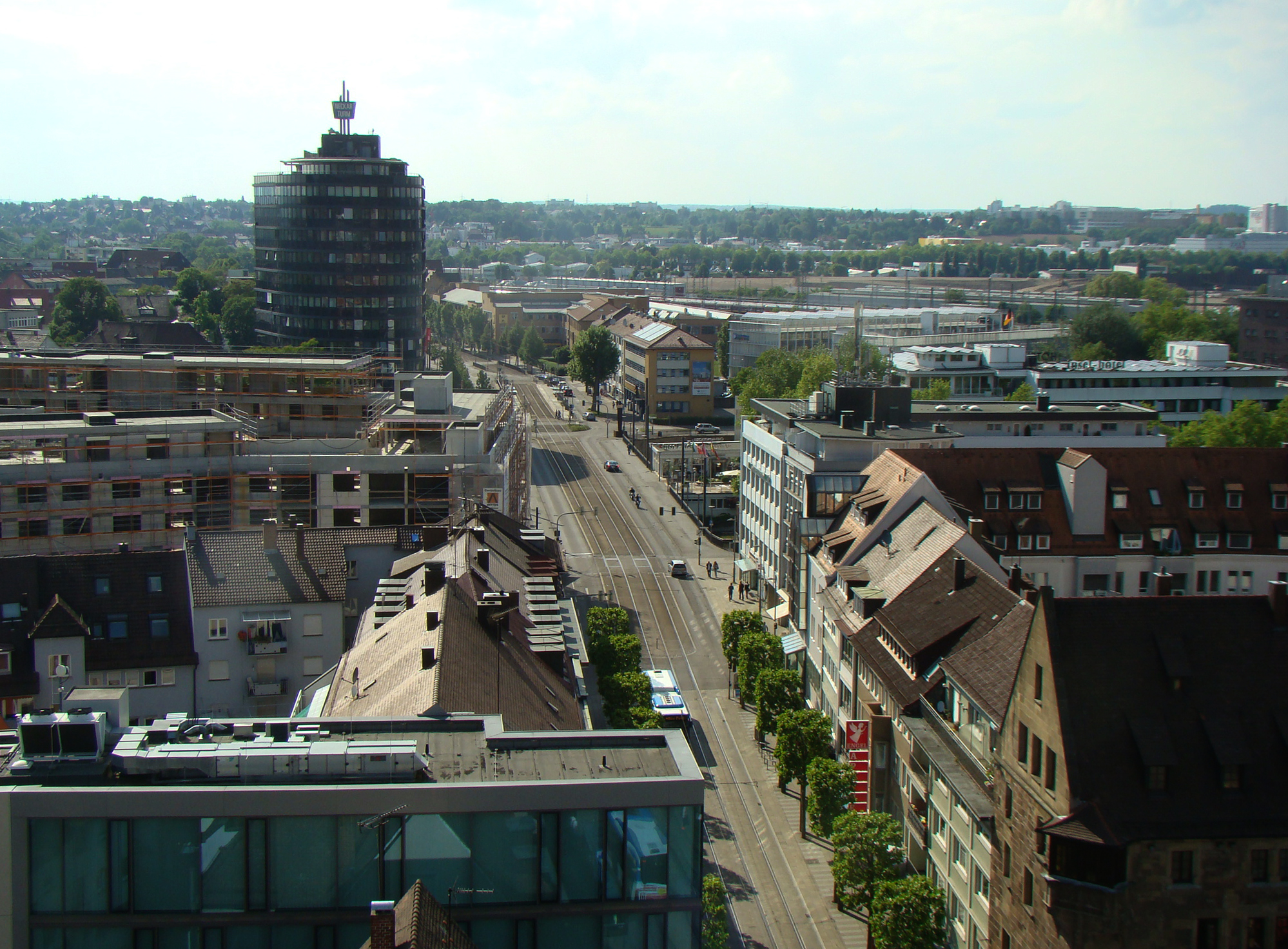 Heilbronn, Blick vom Turm der Kilianskirche über die Stadt